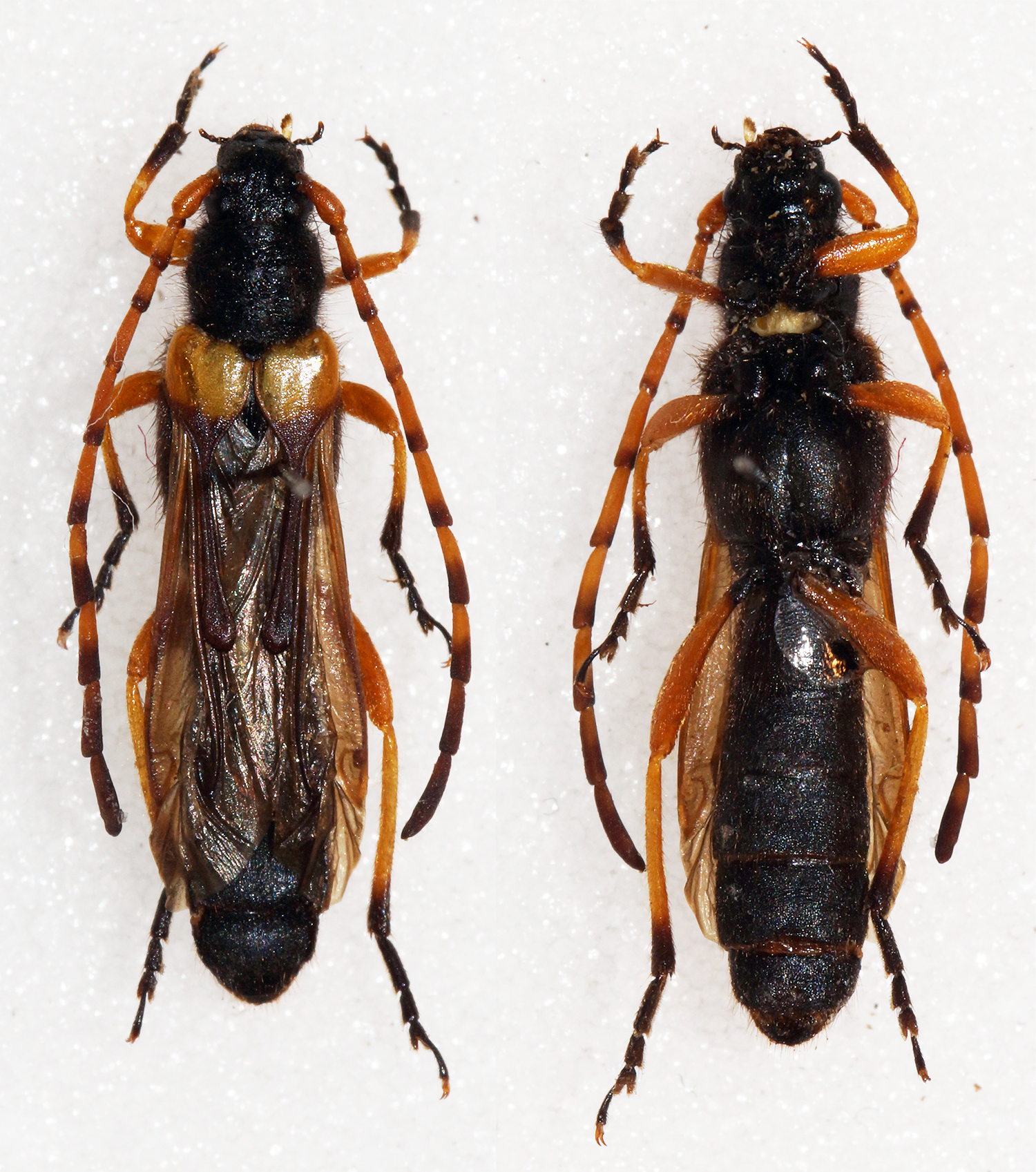 Guérin-Méneville,1839 Sex: ? Data: 01-2014 - Recinto 700m - Nuble - Chile Size: 14.5mm